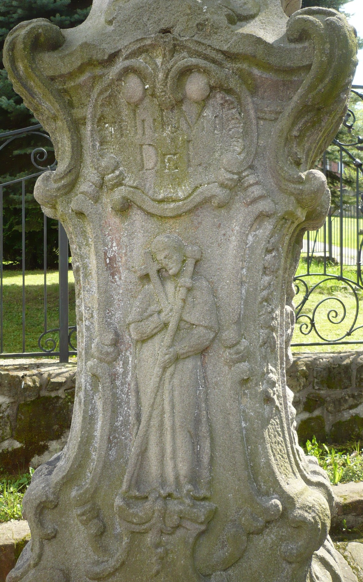 Nowa Ruda, ul. Strzelecka 2 - figura Trójcy Świętej, 1798.